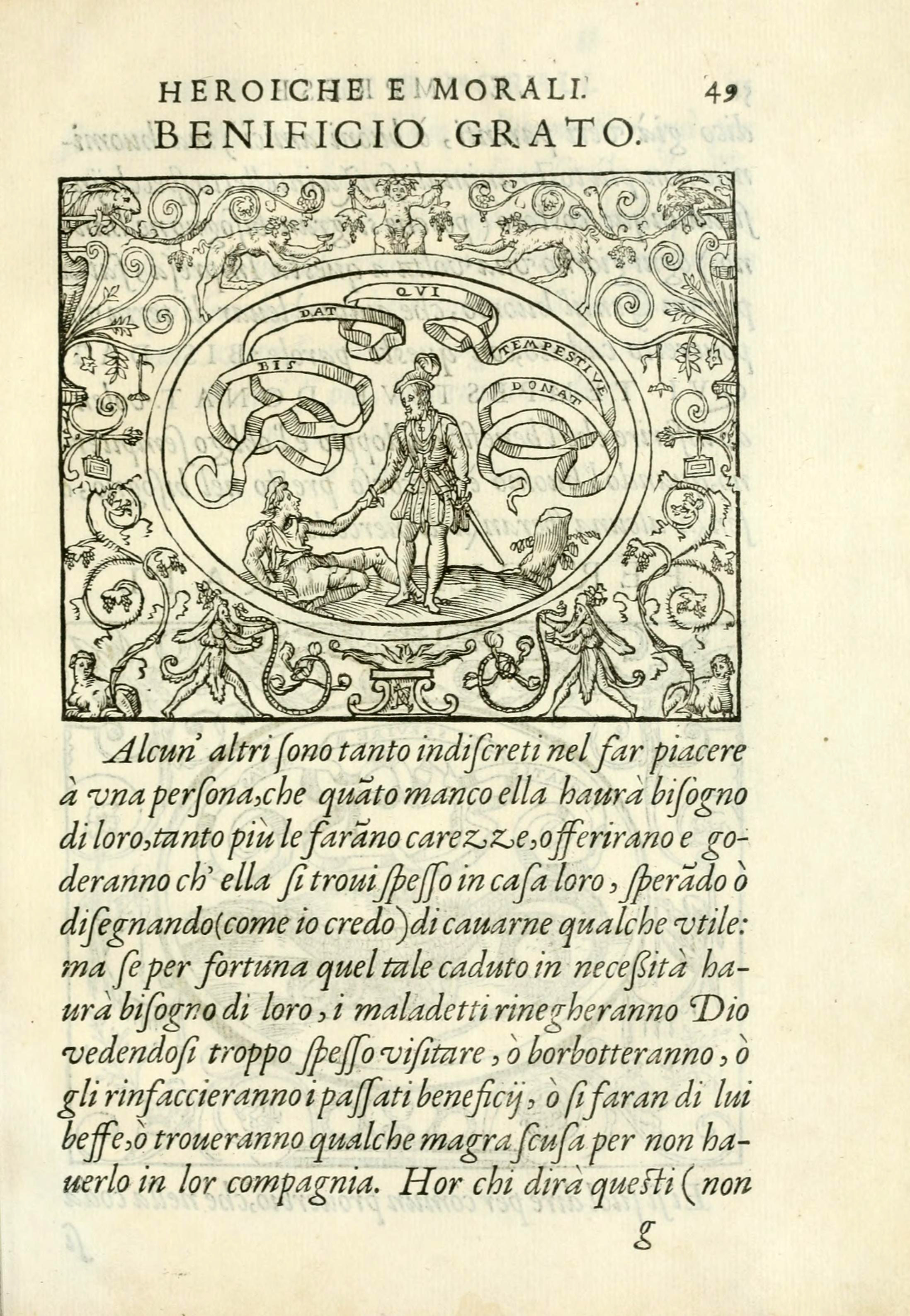 Emblem from Le imprese heroiche et morali.